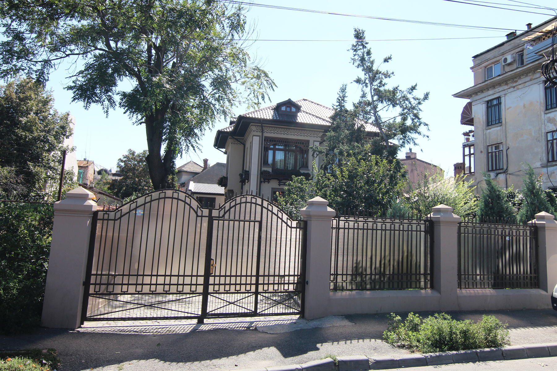 Imobil pe Calea Călărașilor